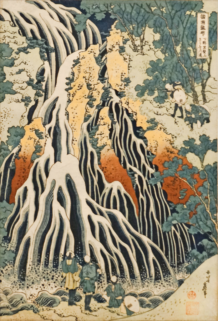 Voyage au fil des cascades des différentes provinces (Shokoku Takimeguri), Les chutes d'eau de Kirifuri sur le Mont Kurokami dans la province de Shimotsuke (Shimotsuke Kurokamiyama Kirifuri no taki), 1833, Impression polychrome (Nishiki-e), format ôban, Editeur: Nishimuraya Yohachi, Cachet de censure : kiwame Signature: Zen Hokusai Iitsu hitsu, Donation Norbert Lagane, 2001, MA 12179 Musée national des arts asiatiques, musée Guimet Le musée Guimet présente, jusqu’au 7 janvier 2013, dans la rotonde, une quarantaine d’œuvres de Katsushika Hokusai (1760-1849), comprenant des peintures, des estampes et des dessins. Cet artiste exceptionnel qui a transformé l'art de l'estampe au 19ème siècle et influencé les artistes occidentaux (japonisme) est connu du public pour ses représentations du Mont Fuji et de la grande vague bleue. On retrouve ces images cultes dans l'exposition mais on en découvre d'autres moins diffusées comme celle sur la photo ci-dessus. Très peu éclairée pour des raisons de conservation et serrée dans les vitrines de la rotonde, cette petite exposition, où il est permis de photographier, n'est pas très bien présentée, elle est néanmoins un évènement pour les amateurs d'art asiatique.